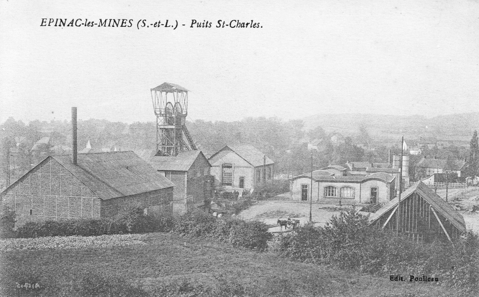 Le puits Saint-Charles (Houillères d’Épinac, France).